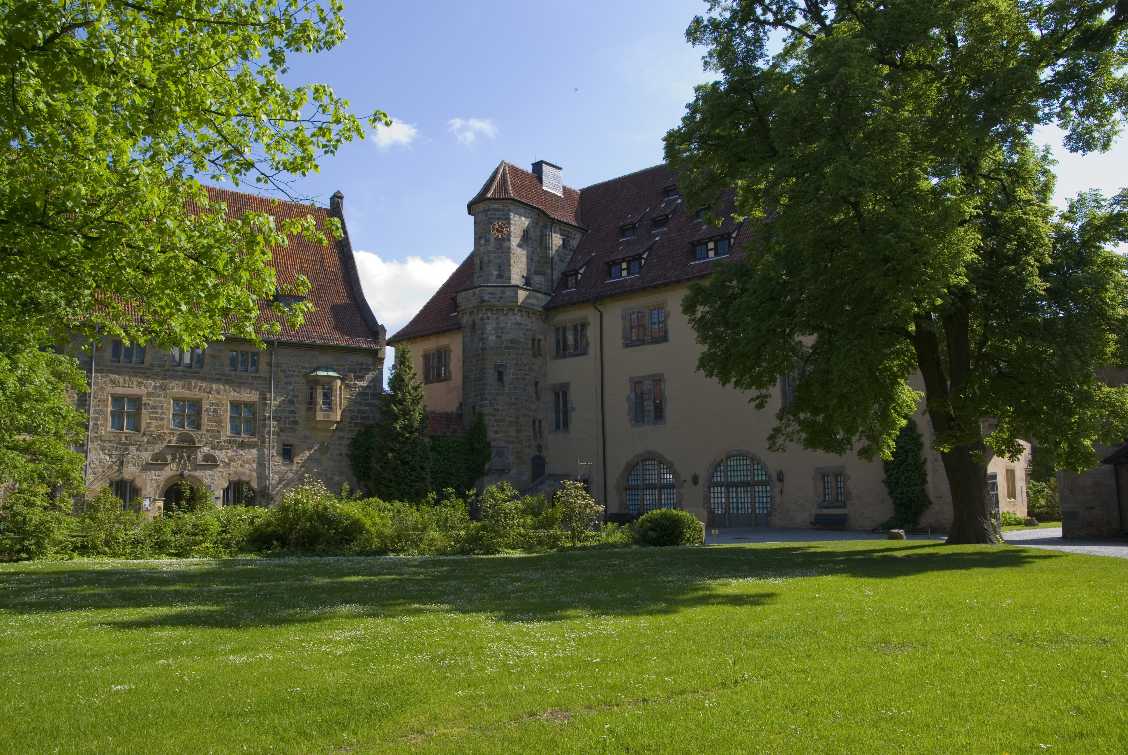 Veste Coburg, Innenhof II